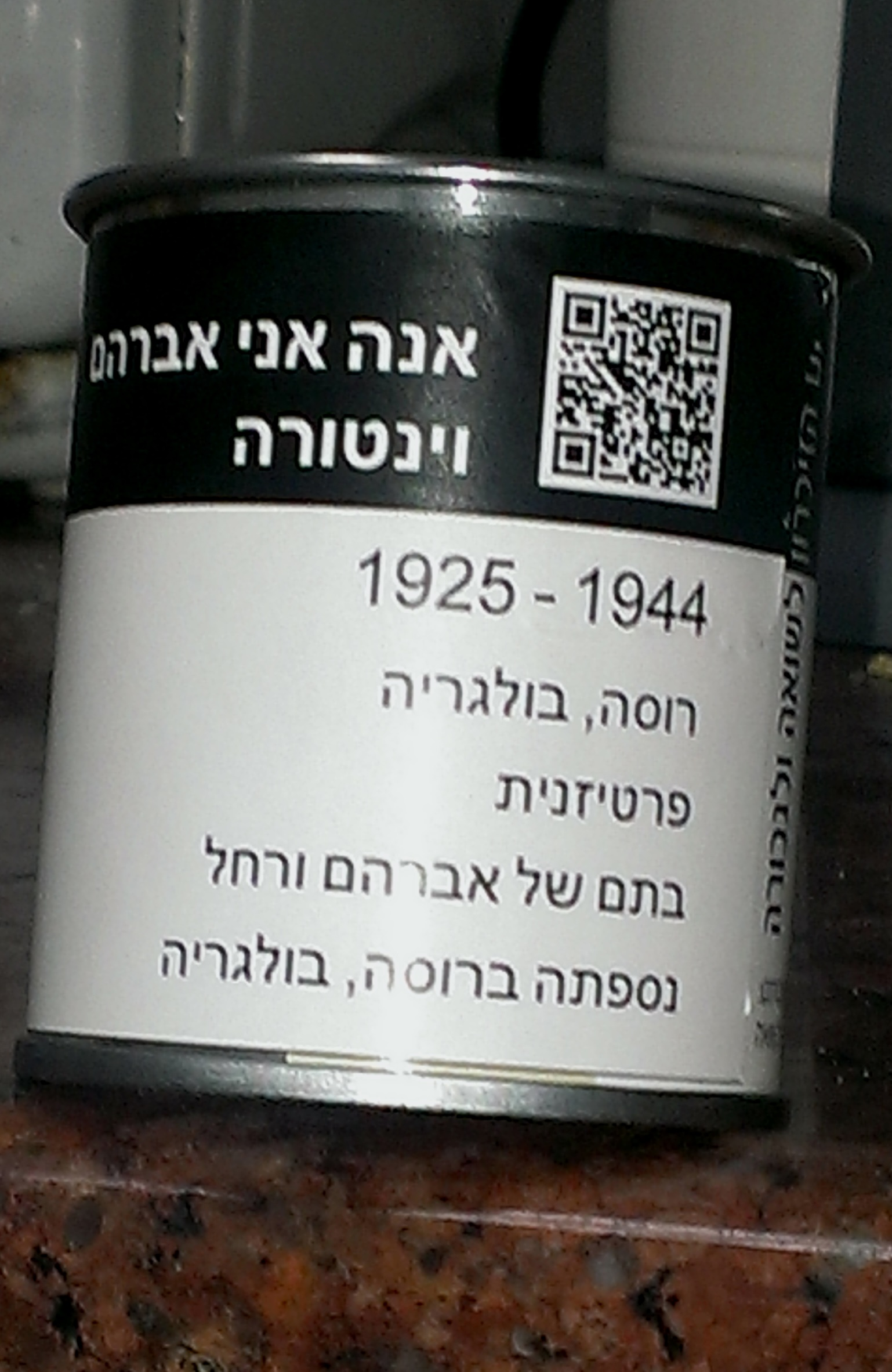 נר נשמה שחולק בבתי הספר התיכוניים במסגרת אירועי יום השואה והגבורה 2014 ומנציח את אנה ונטורה